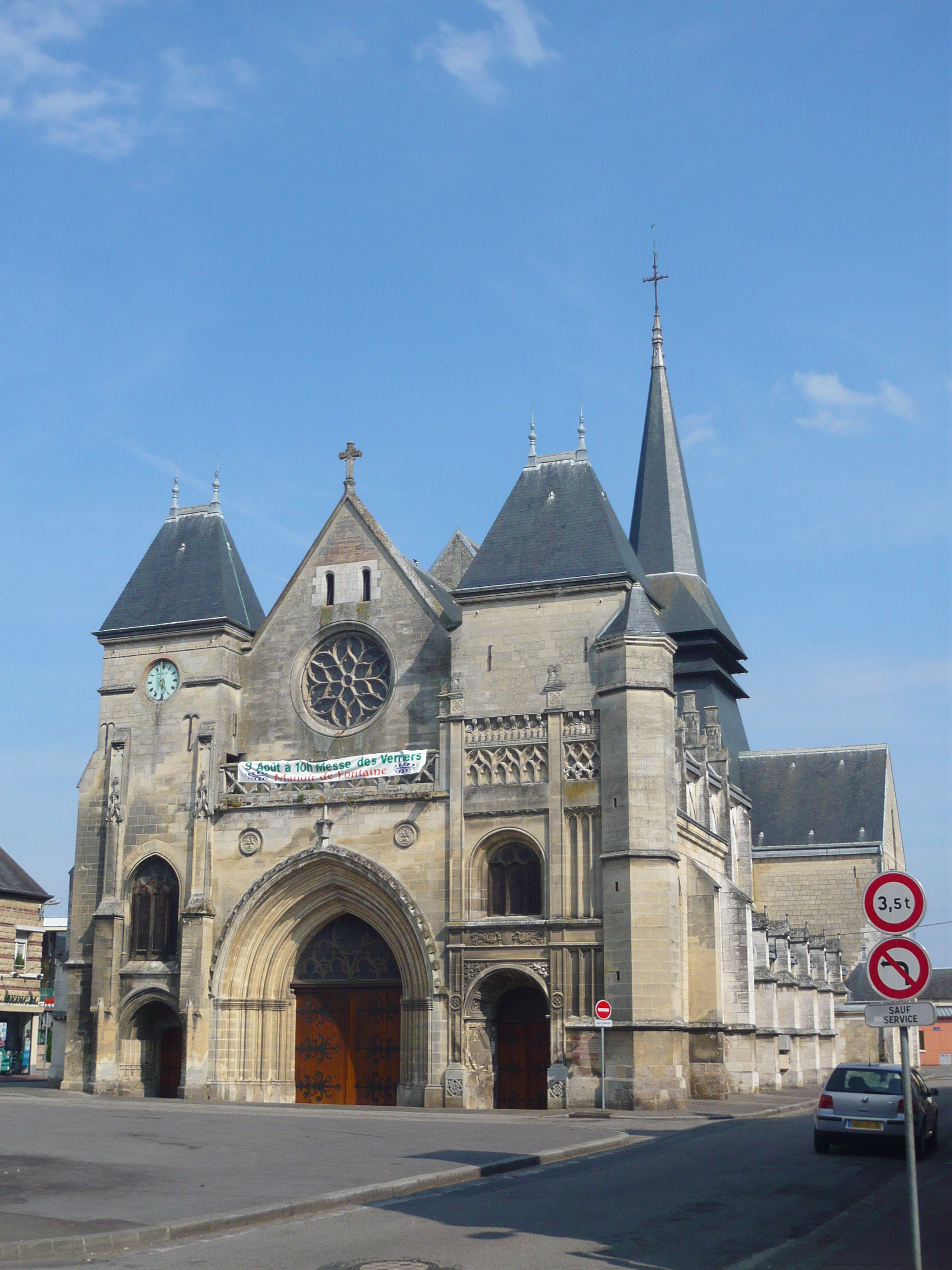 Face avant de l'Eglise de Blangy-sur-Bresle